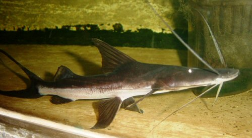 Nombre común : Bagre baboso, 747 bagres Familia : Pimelodidae Origen : Bolivia, Brasil, Colombia, Ecuador, Perú, Venezuela . Un atlas de bagres de agua dulce y marinos. Un estudio preliminar de los Siluriformes.